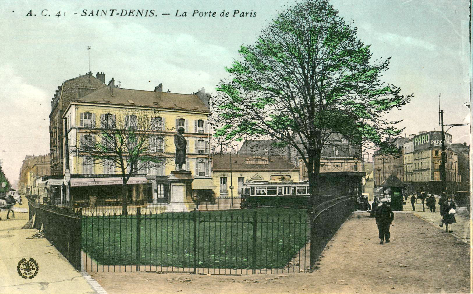 Carte postale ancienne éditée par AC (Combier) n°41 :SAINT-DENIS - La Porte de Paris